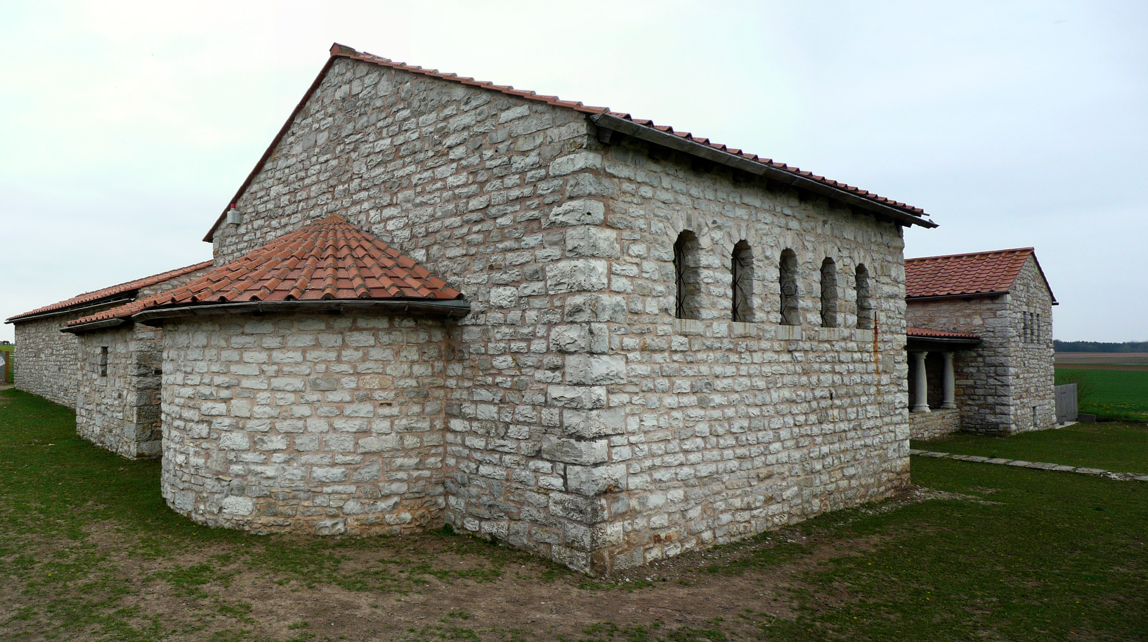 Römischer Gutshof (villa rustica) in Möckenlohe (Originalgetreue Rekonstruktion Ende 20. Jh.).